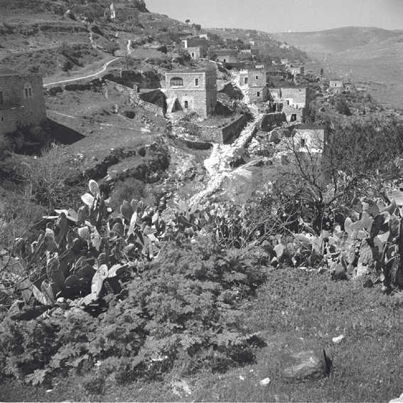 מ ינפתוח - מראה כללי